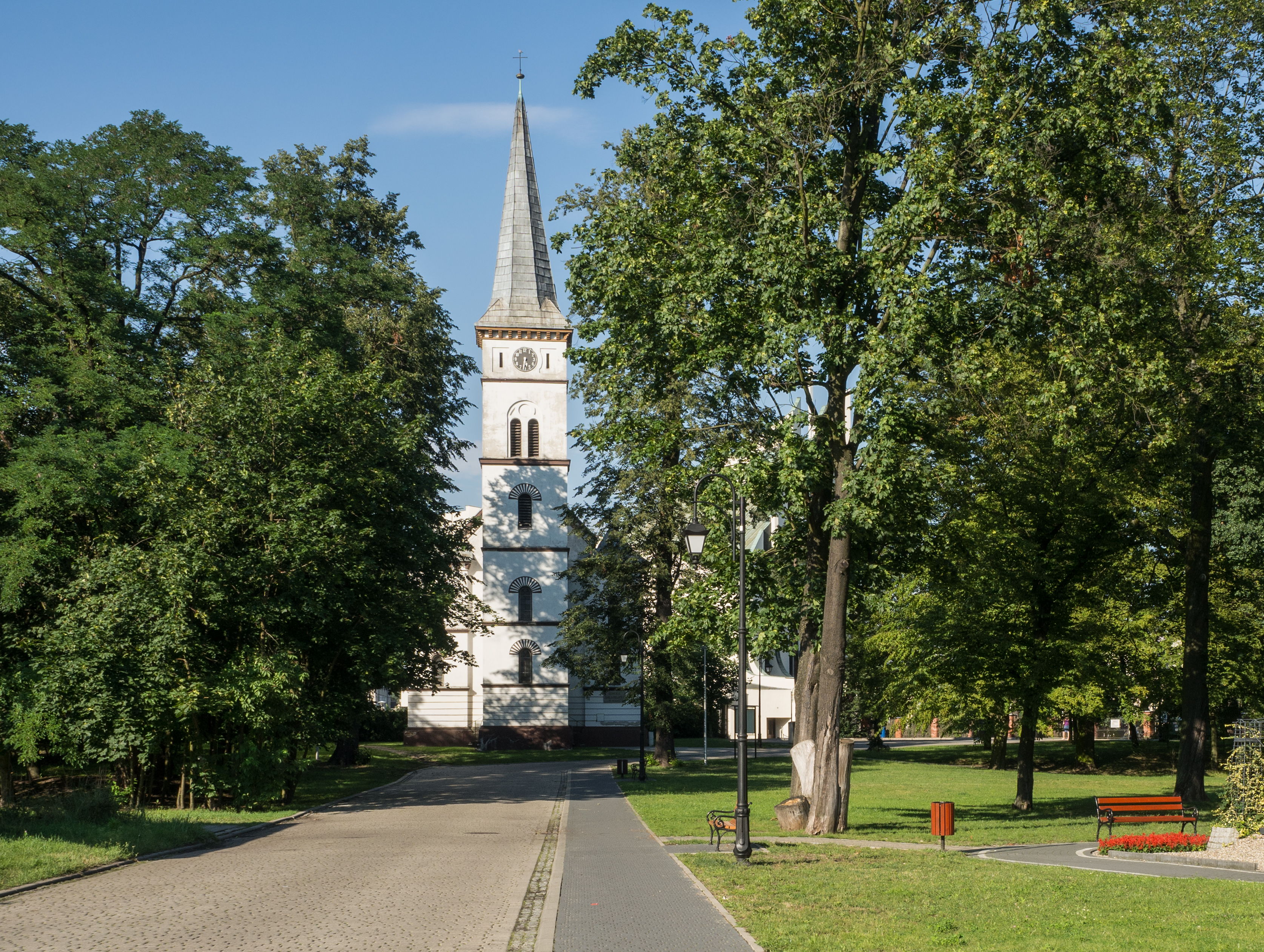 Ozimek, kościół ewangelicki, XIX